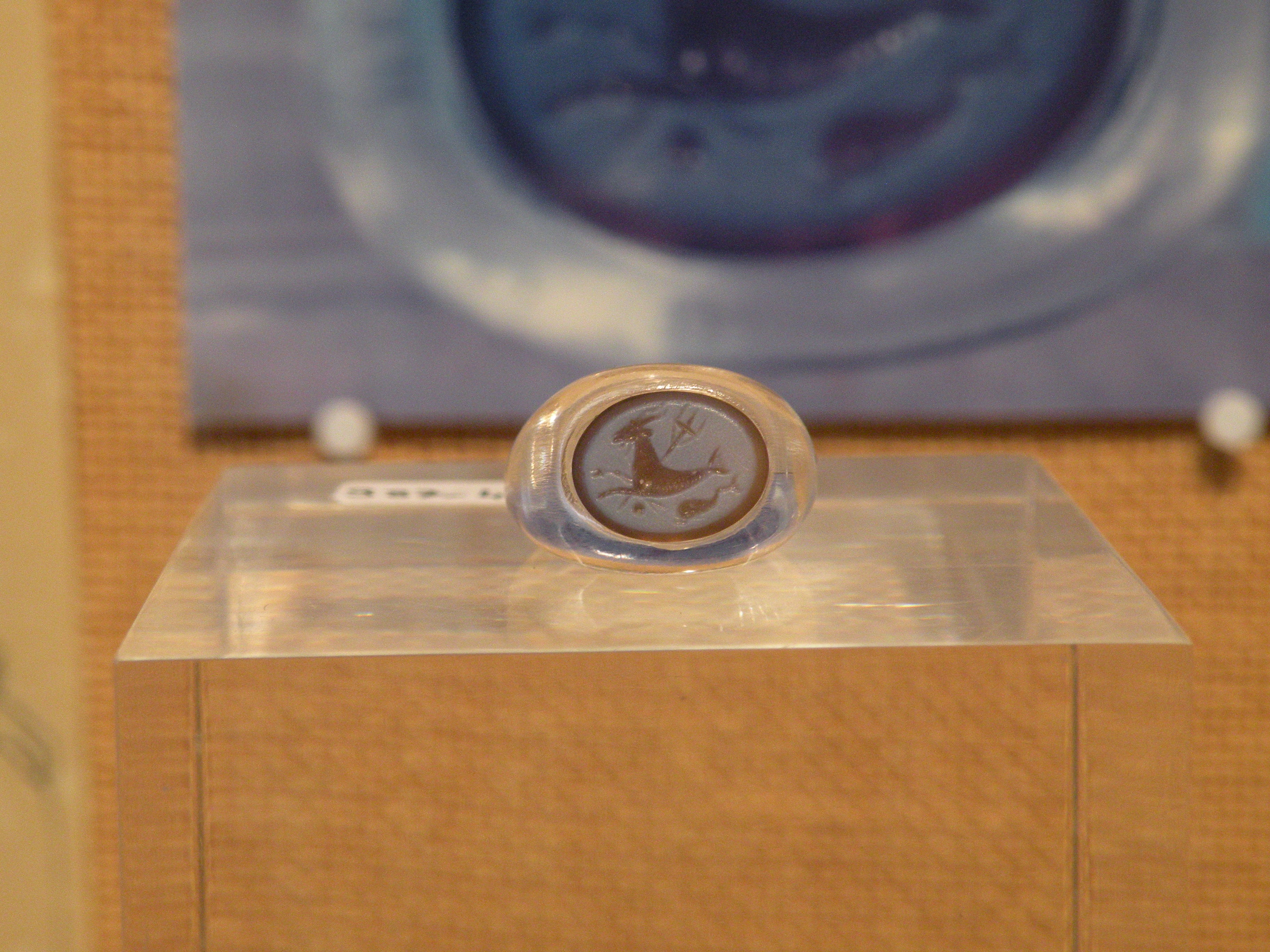 Musée de Thésée (Loir-et-Cher) Bague représentant un capricorne un dauphin et un trident.